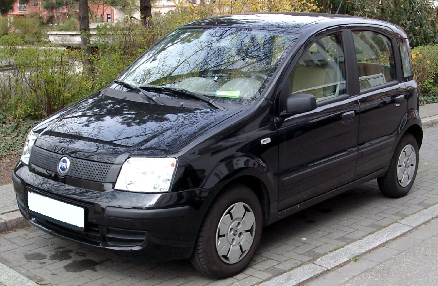 Fiat Panda (2003)